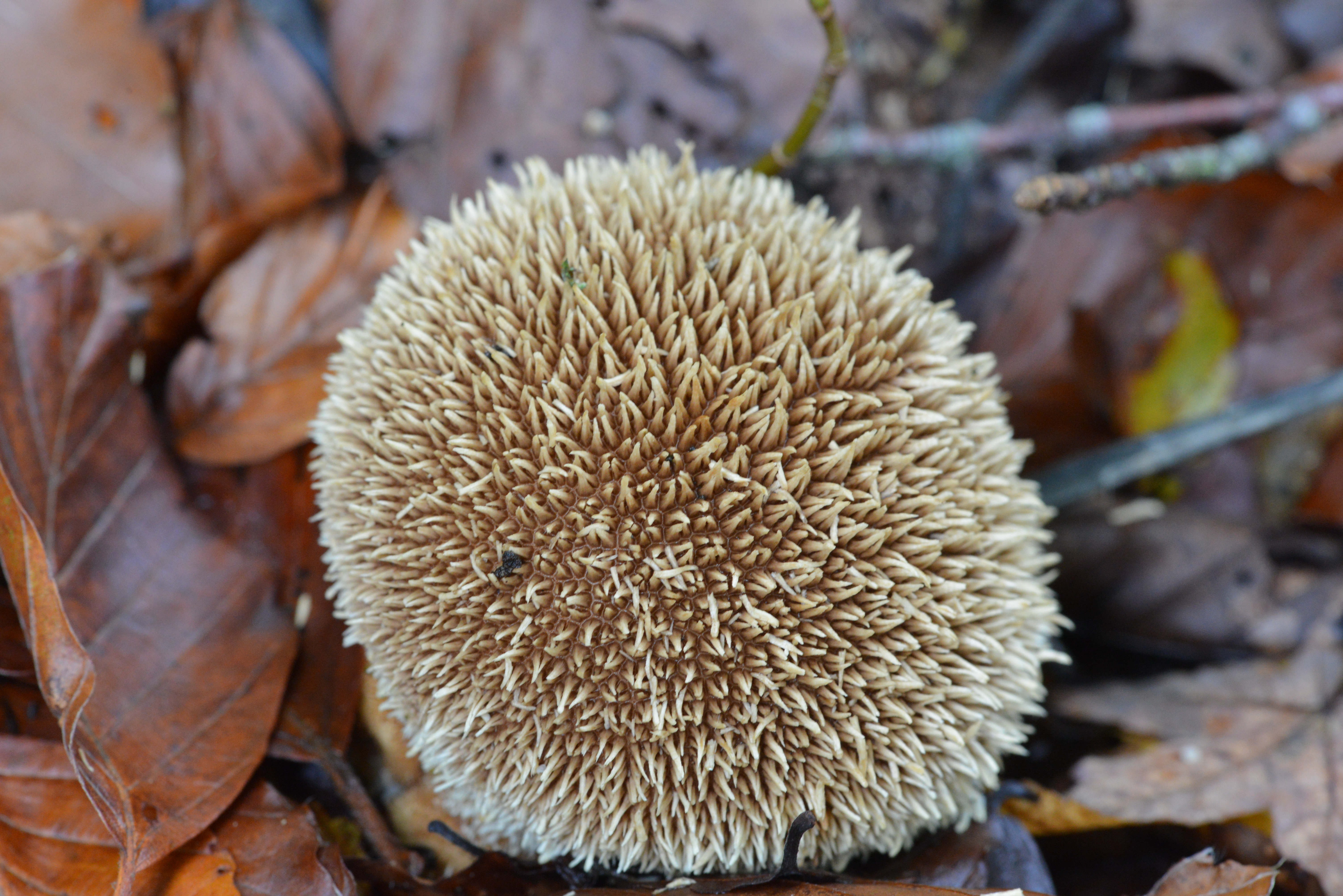 Sous hêtre (Fagus sylvatica)